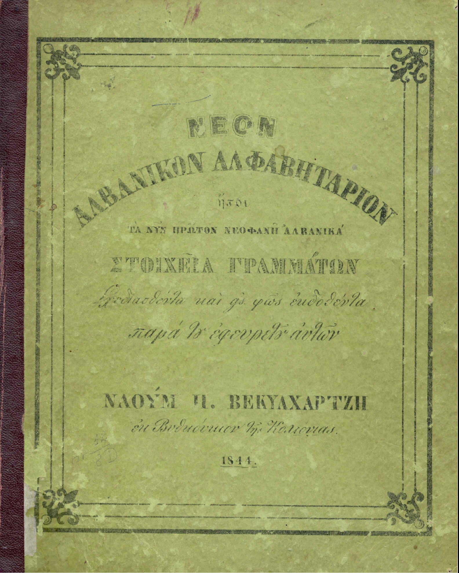 Abetarja e Naum Veqilharxhit